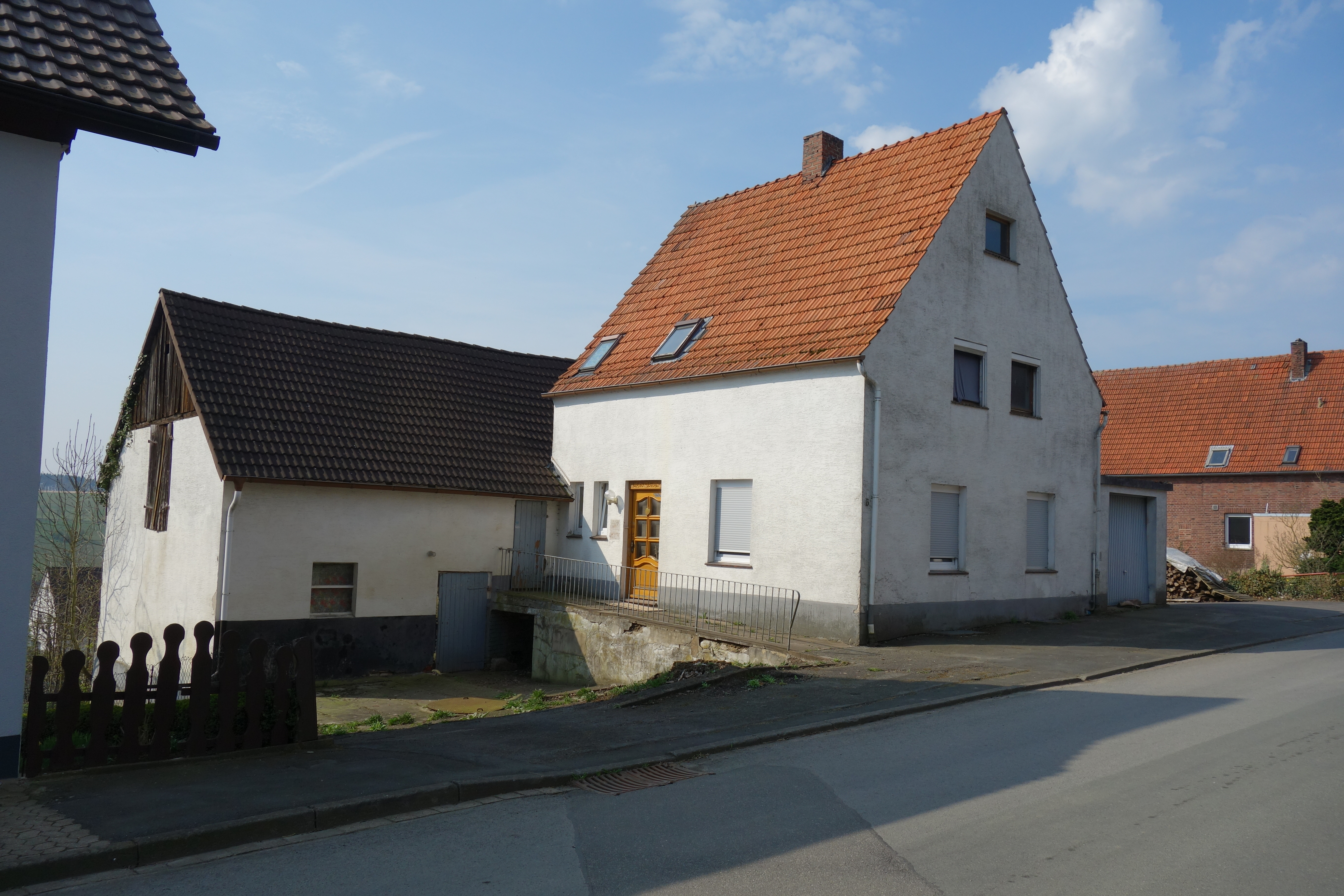 Haus Kriminalfall Höxter am Saatweg in Höxter-Bosseborn von Nordosten.